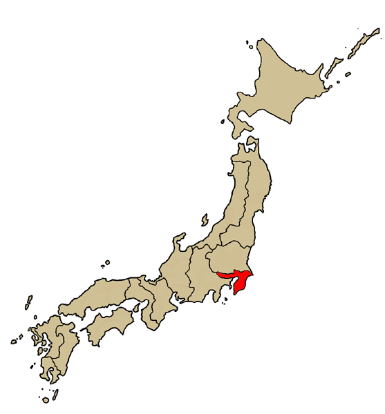 Mappa dell'arcidiocesi cattolica di Tokio, in Giappone. Lavoro personale.